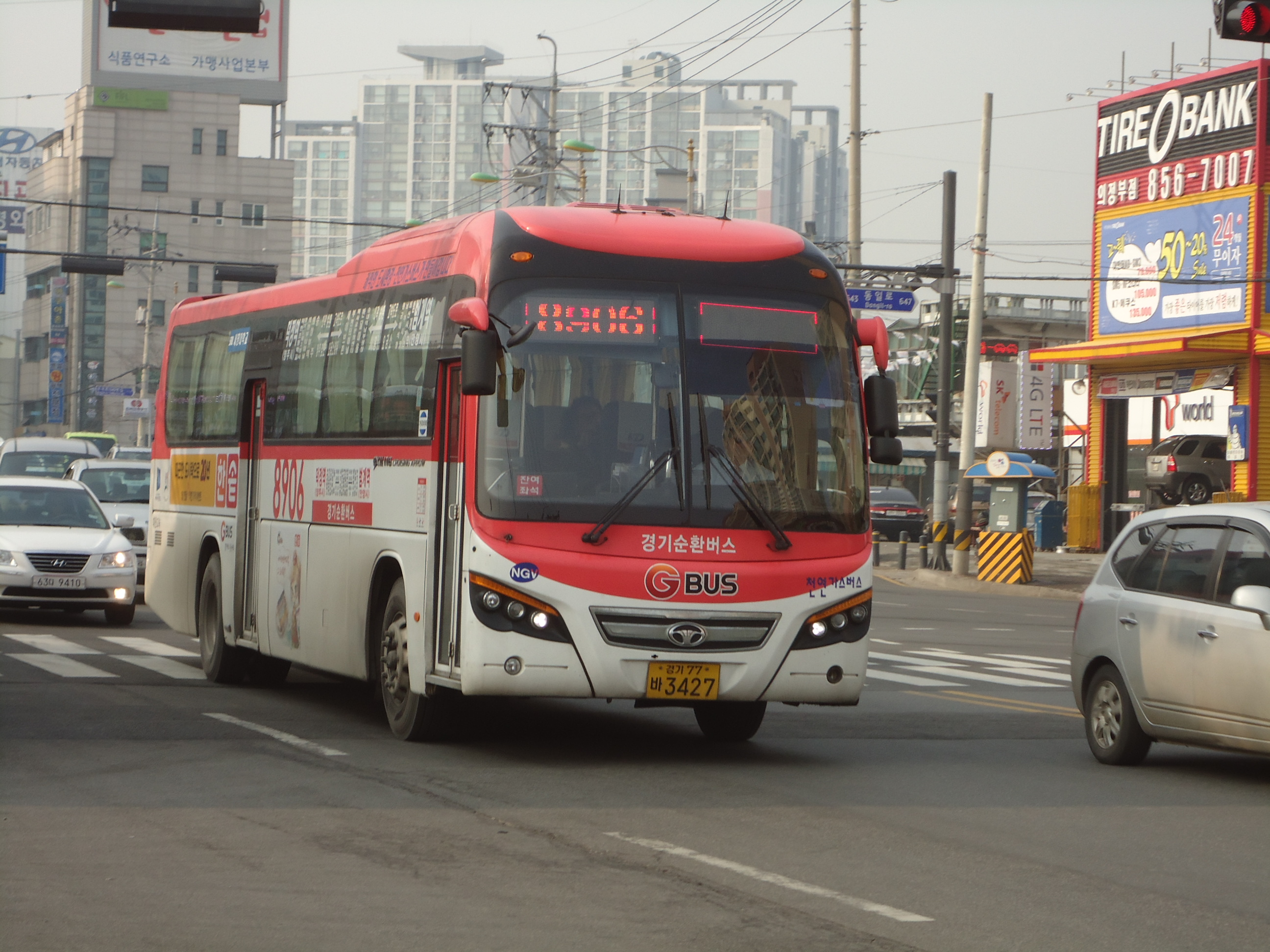 경기순환버스 8906번(의정부-범계역) FXⅡ116